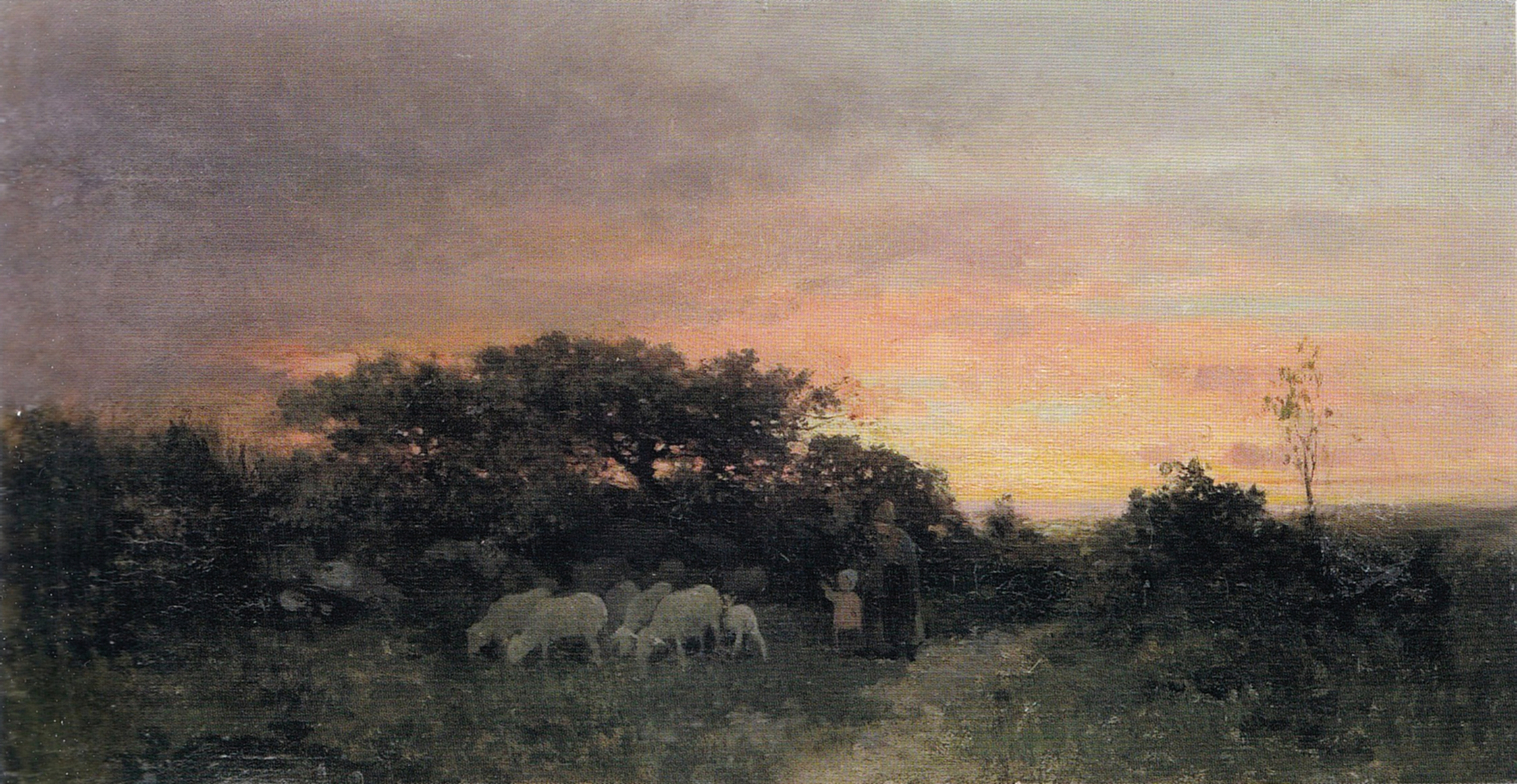 Apus de soare la Barbizon, ulei pe lemn - Galeria de Artă Românească Modernă de la Muzeul Național de Artă al României.